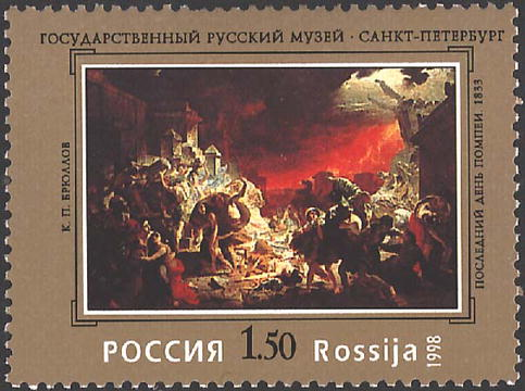 К. П. Брюллов. «Последний день Помпеи» (1883).